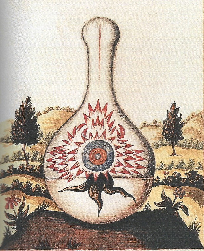 Decima immagine dal trattato Pretiosissimum Donum Dei, di Georges Aurach, edito nel XVII secolo: tavola intitolata «Cinis Cinerum» («cenere delle ceneri»).